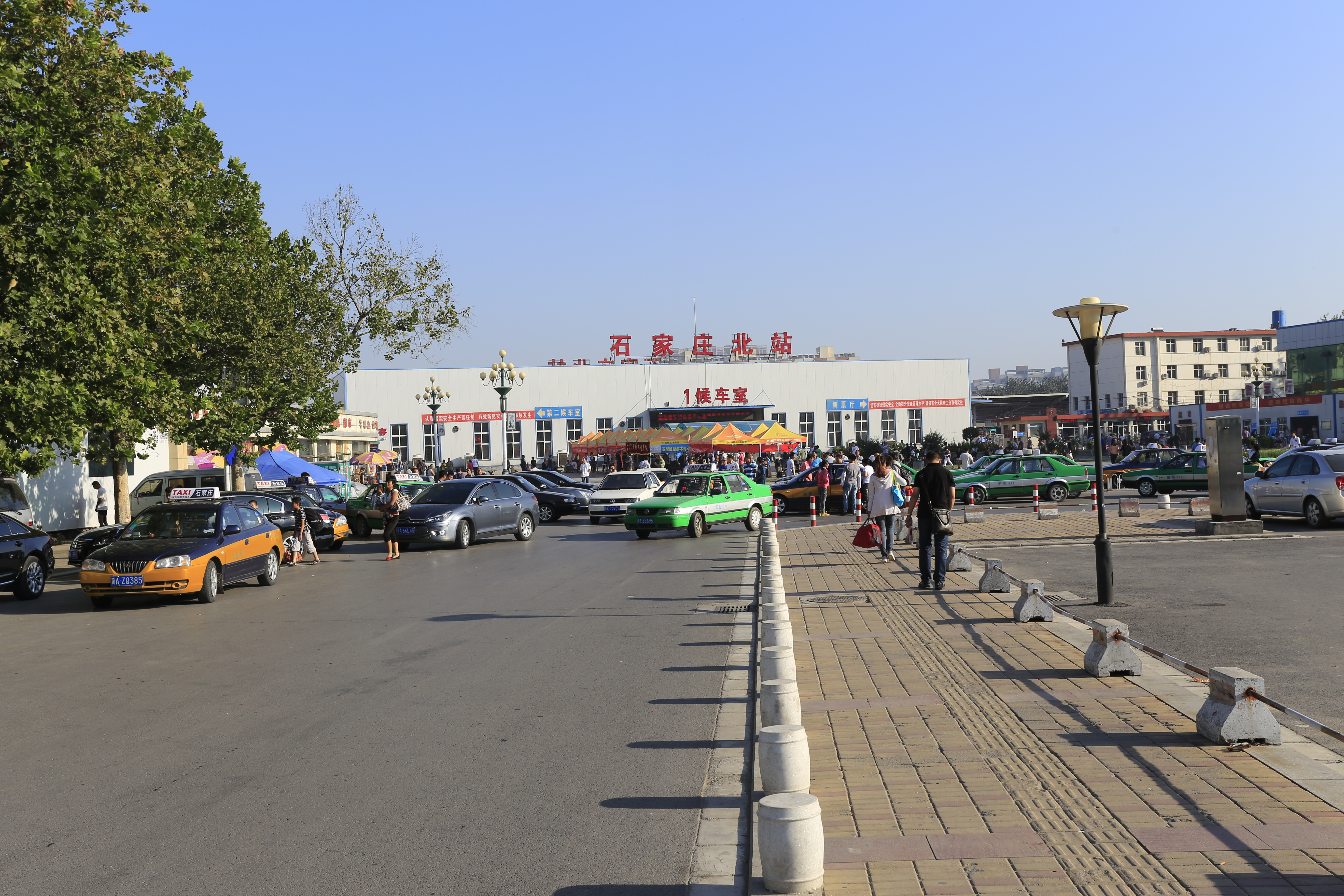 石家庄北站